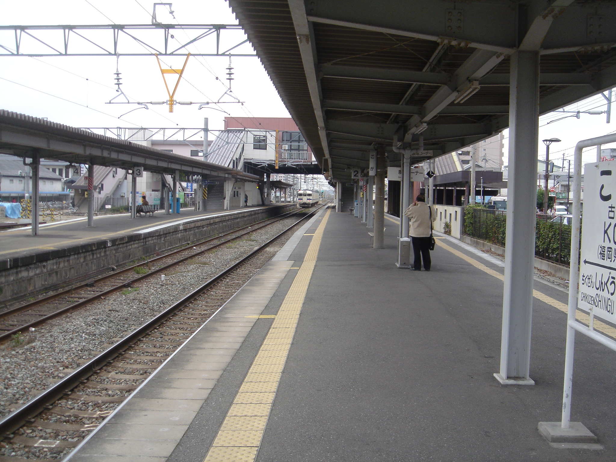 古賀駅ホーム